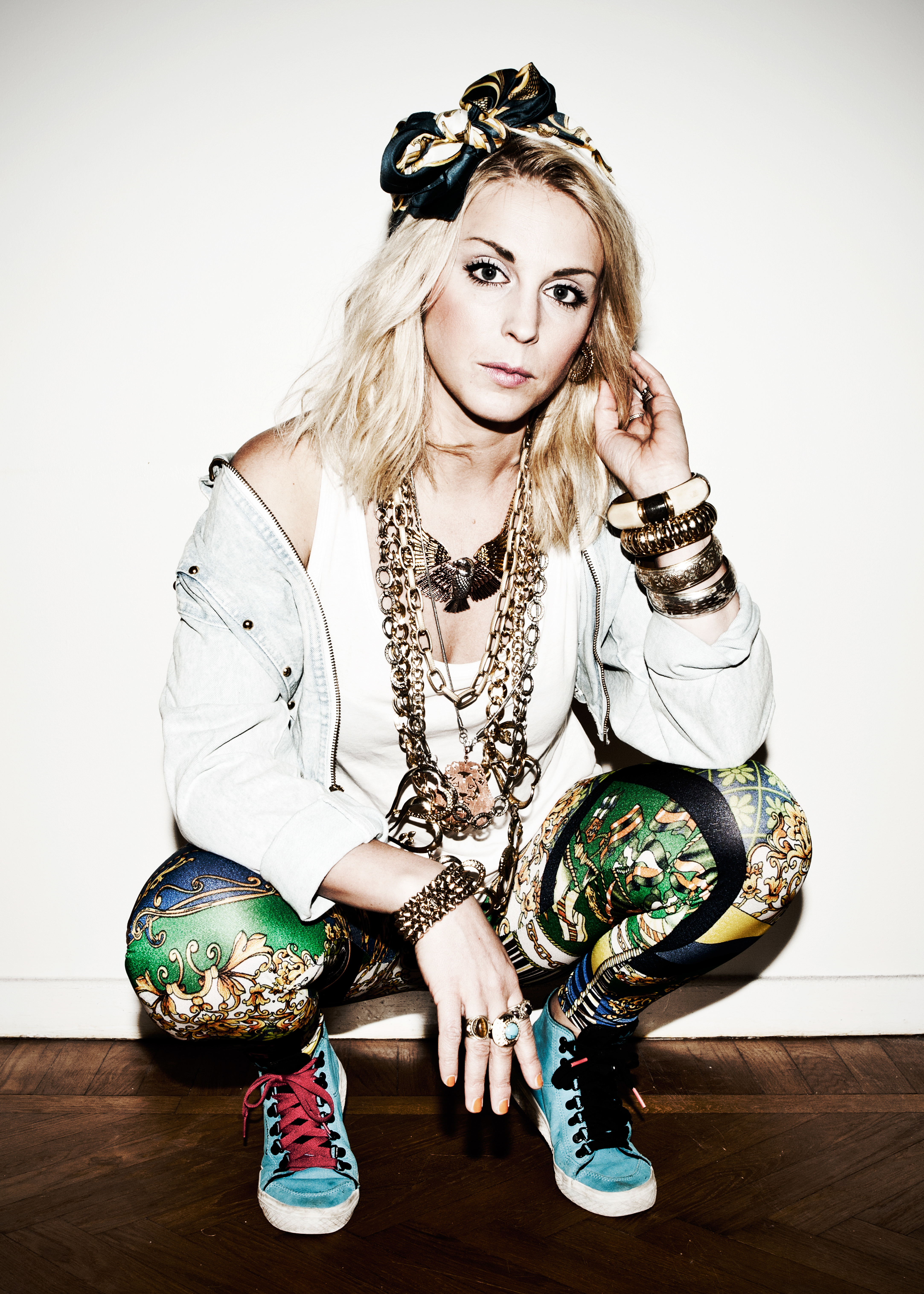 Syster Sol